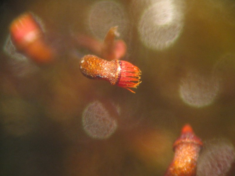 Rotes Kleingabelzahnmoos (Dicranella varia), Sporogonenkapsel mit Peristomzähnen, etwa 25x vergrößert